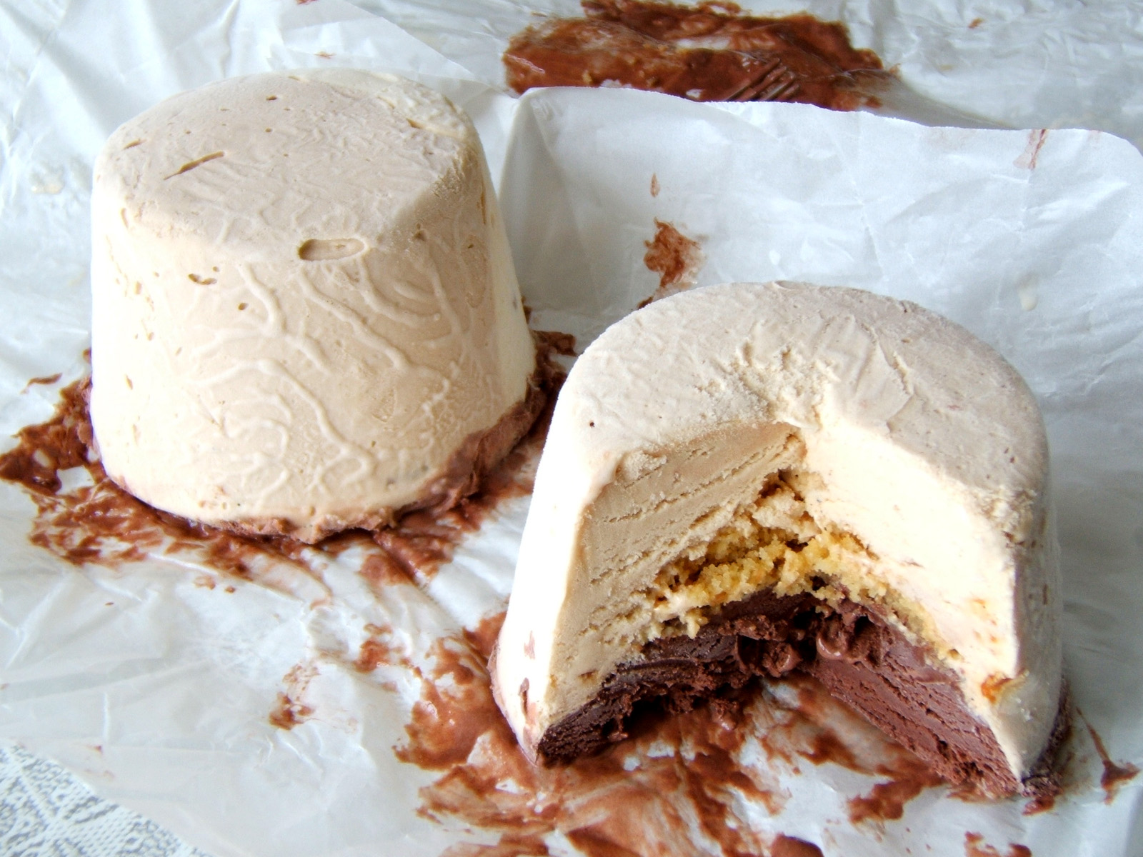 Spumoni al cioccolato e nocciola